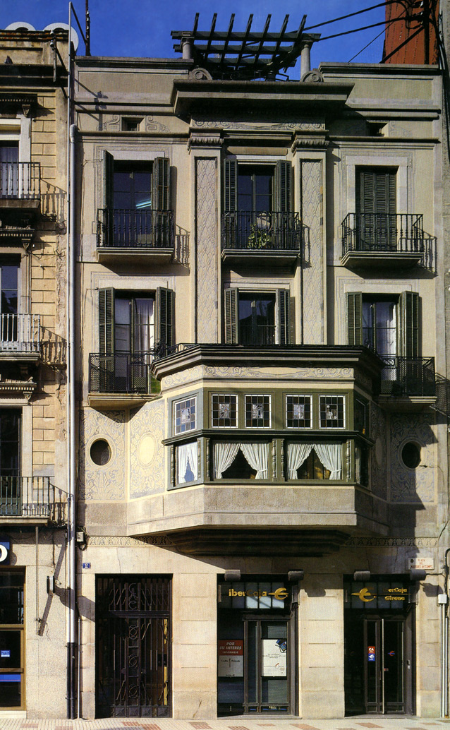 Reforma i ampliació